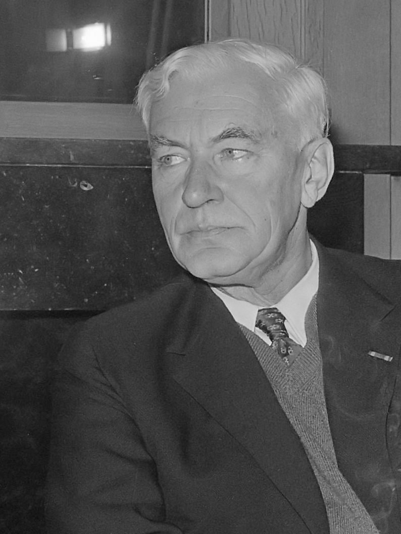 Drie progressieve partijen (PvdA, D66, PPR) presenteren schaduwkabinet, mr. M. van der Stoel (l) en prof. dr. B. V. A. (Bert) Roling 18 november 1972